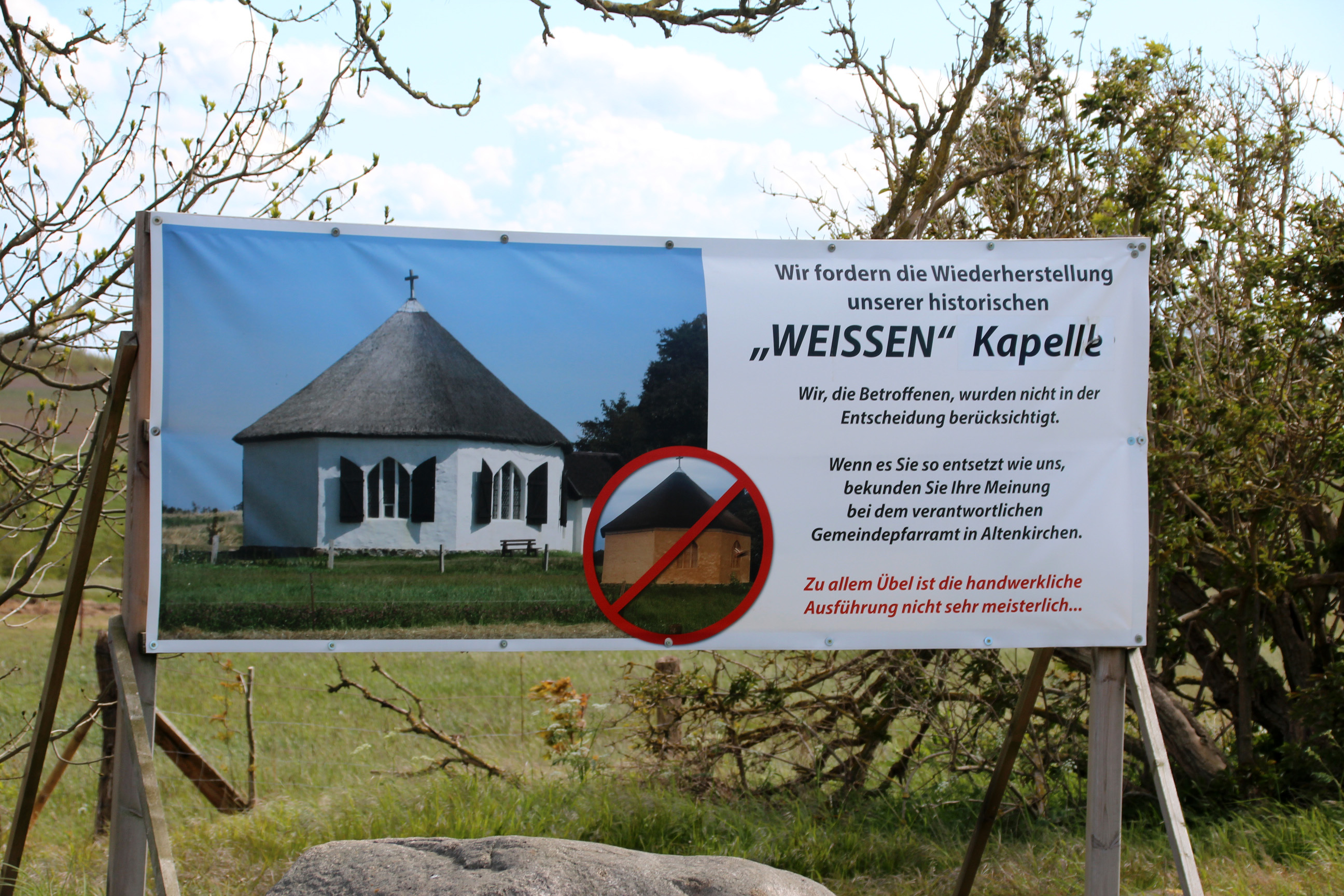 Wegen der 2017 veranlassten geänderten (originären) Farbgebung der Vitter Kapelle kam es zu Protesten.